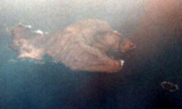 Montaña Clara selbst aus dem Flugzeug fotografiert.